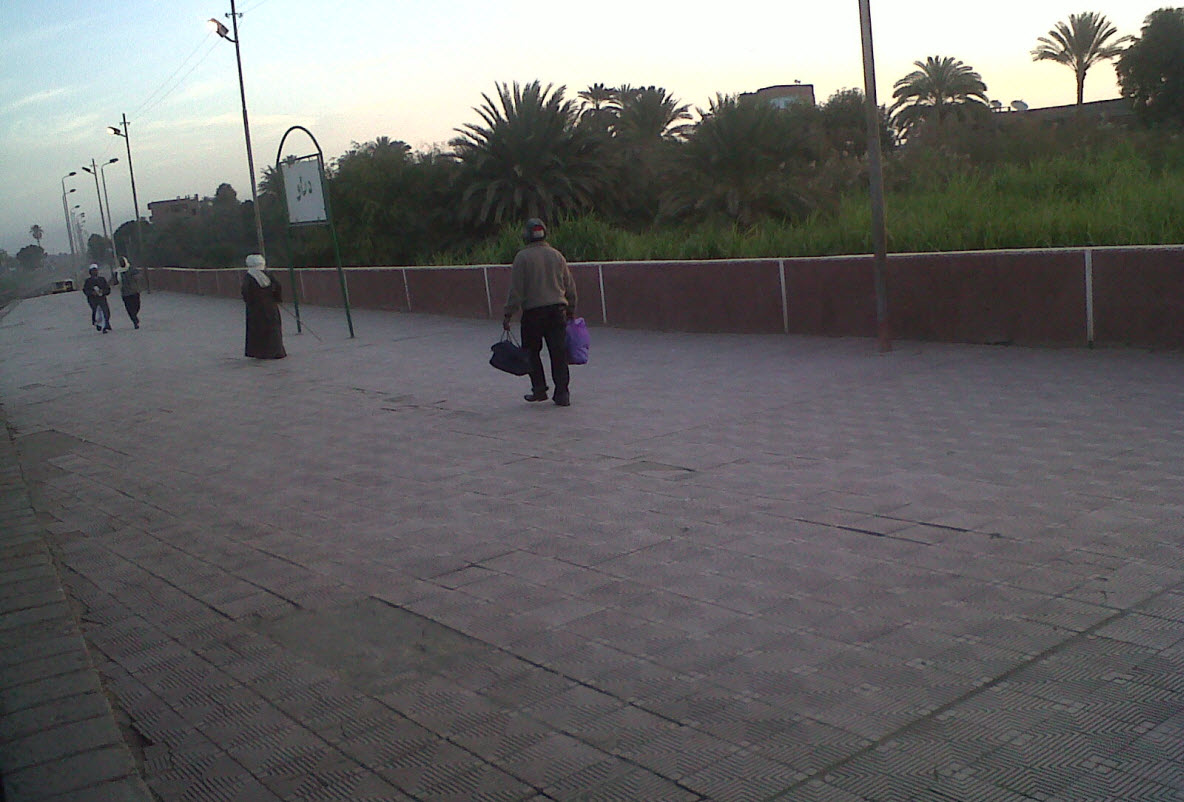 رصيف القطار-دارو